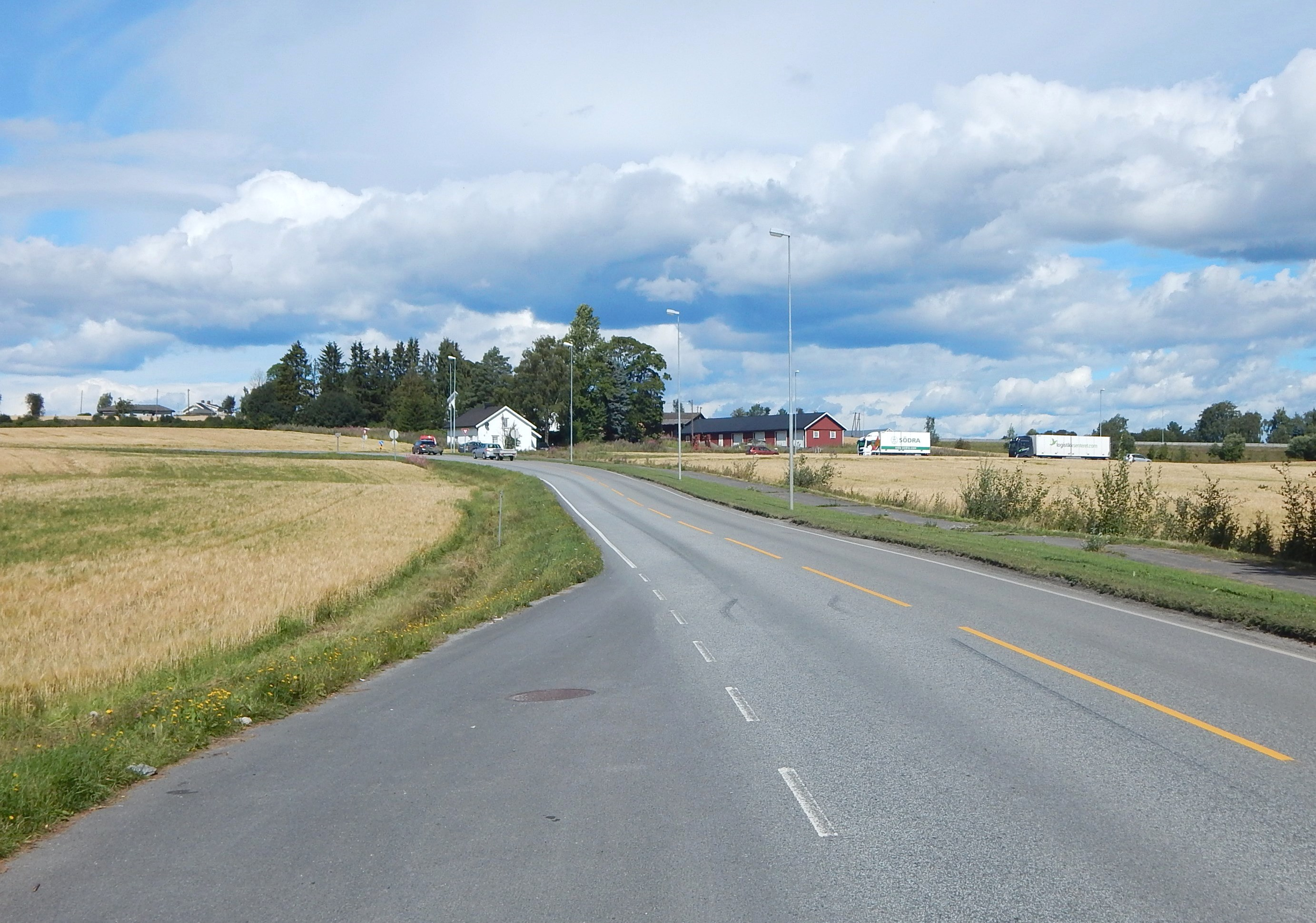 Ljøstadvegen på Stange (fylkesvei 1898, tidl. 230)